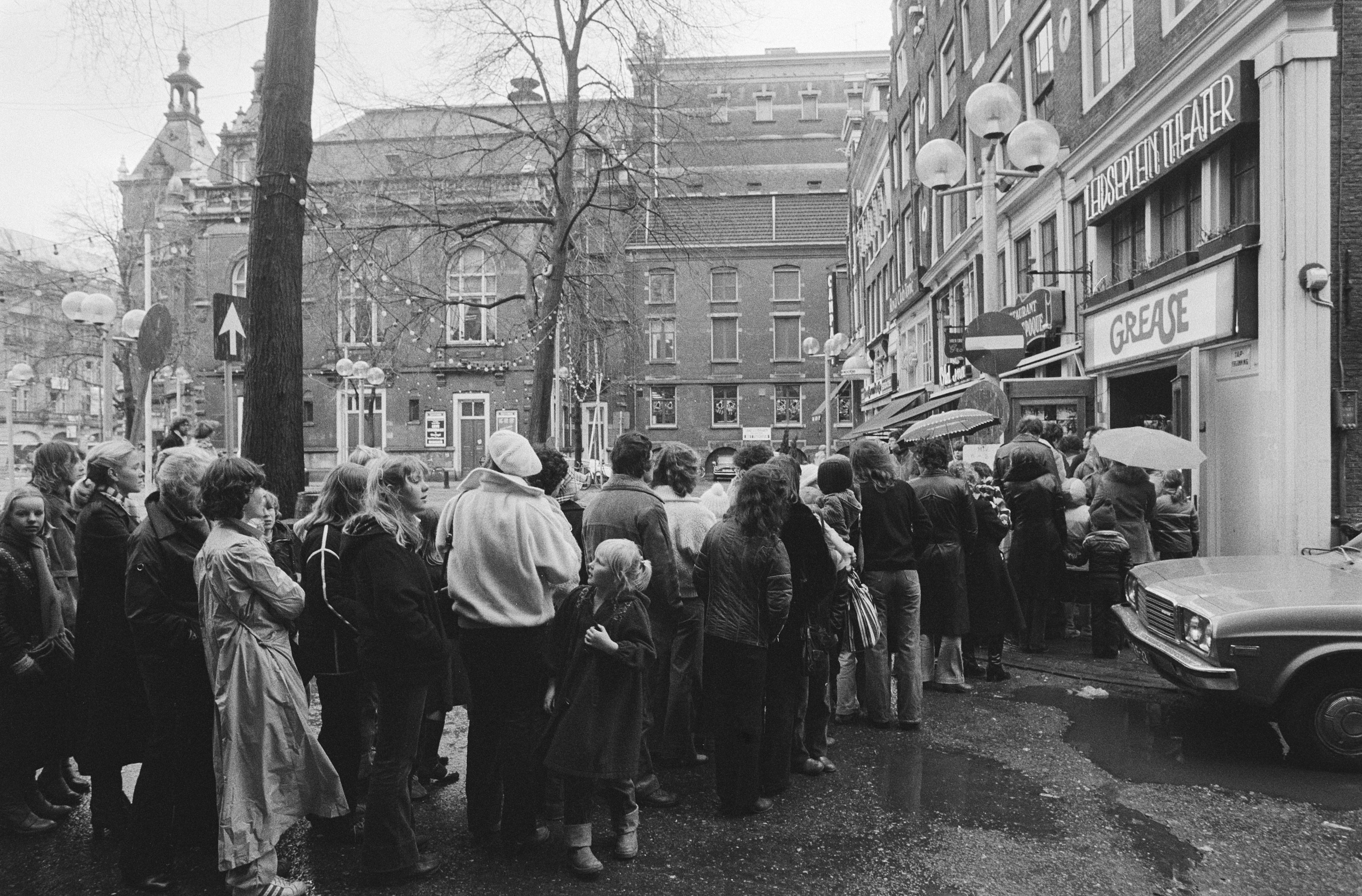 Collectie / Archief : Fotocollectie Anefo Reportage / Serie : [ onbekend ] Beschrijving : Film "Grease" met John Travolta nog steeds succes; lang rij wachtenden voor bioscoop Leidsepleintheater in Amsterdam Datum : 28 december 1978 Locatie : Amsterdam, Noord-Holland Trefwoorden : bioscopen, films, publiek Persoonsnaam : Leidsepleintheater Fotograaf : Dijk, Hans van / Anefo Auteursrechthebbende : Nationaal Archief Materiaalsoort : Negatief (zwart/wit) Nummer archiefinventaris : bekijk toegang 2.24.01.05 Bestanddeelnummer : 930-0604